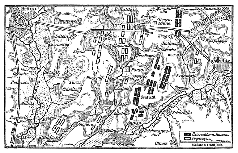 Schlacht bei Austerlitz (2. Dezember 1805), 1 : 180.000